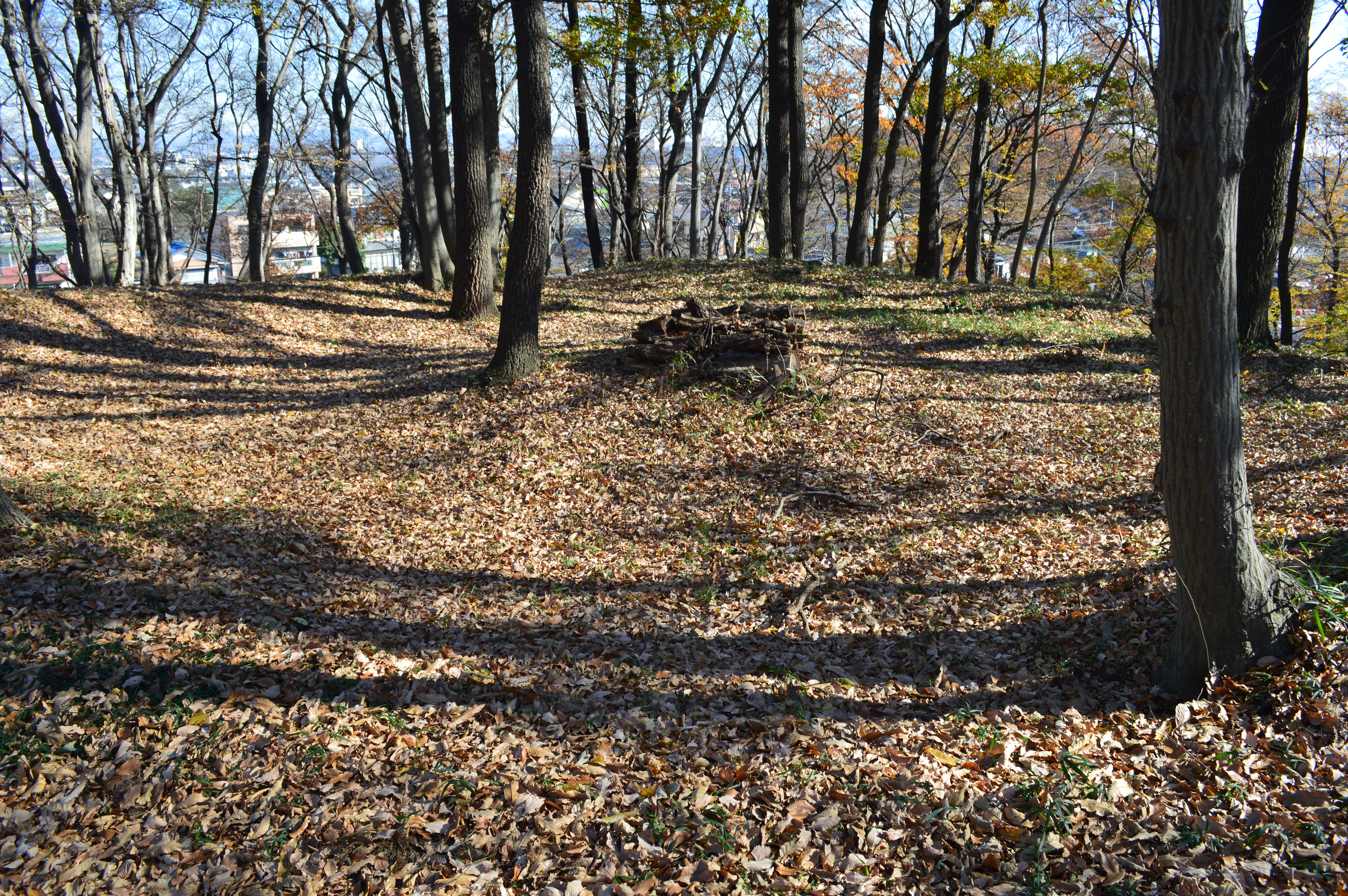 太田天神山古墳 後円部墳頂